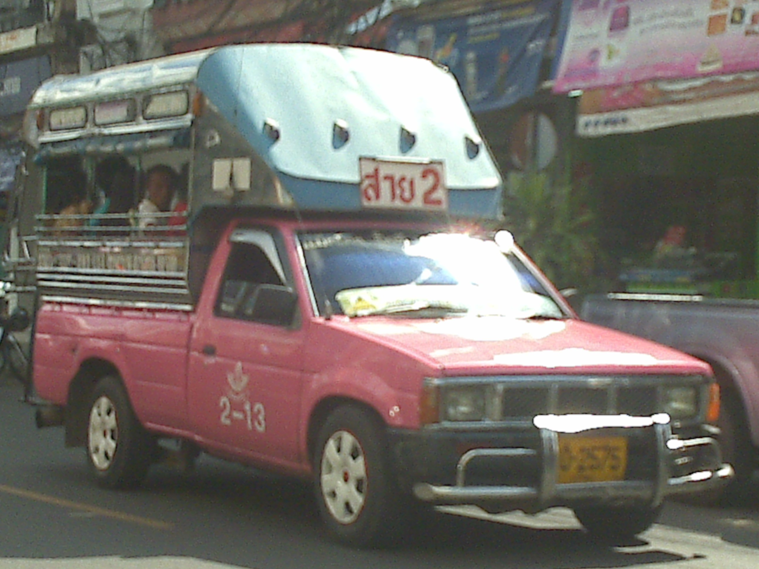 รถสองแถวในจ.บุรีรัมย์